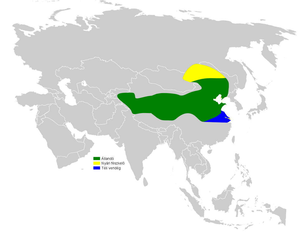 Calandrella cheleensis distribution map, based on